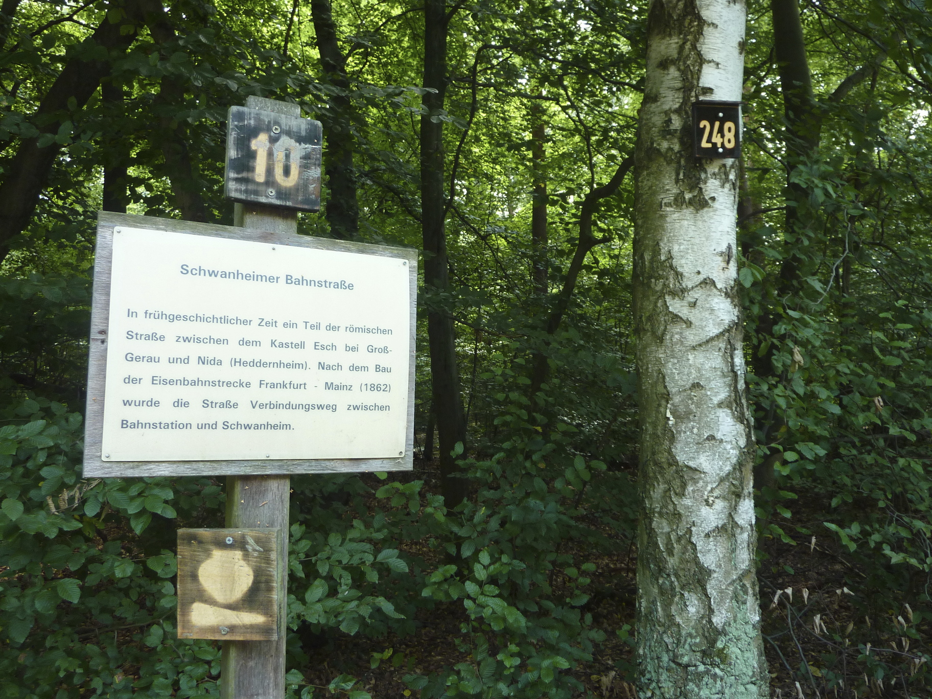 Frankfurt am Main, Bundesland Hessen: Die Kelsterbacher Terrasse ist eine acht Kilometer lange und bis zu 17 m hohe Geländestufe im Frankfurter Stadtwald. Die in west-östlicher Richtung verlaufende und nach Norden hin mäßig steil abfallende Terrasse ist eine Abbruchkante des Main-Urstromtals aus dem Erdzeitalter Pliozän. Sie beginnt im Westen am Mainufer in der Stadt Kelsterbach, durchläuft den Schwanheimer Wald und endet südlich des Frankfurter Stadtteils Niederrad. Entlang der Oberkante der Terrasse verläuft die Grenzschneise, ein historischer Grenz- und Handelsweg. Das Foto zeigt eine Infotafel des Historischen Wanderwegs Schwanheim an der Kreuzung Grenzschneise/Schwanheimer Bahnstraße